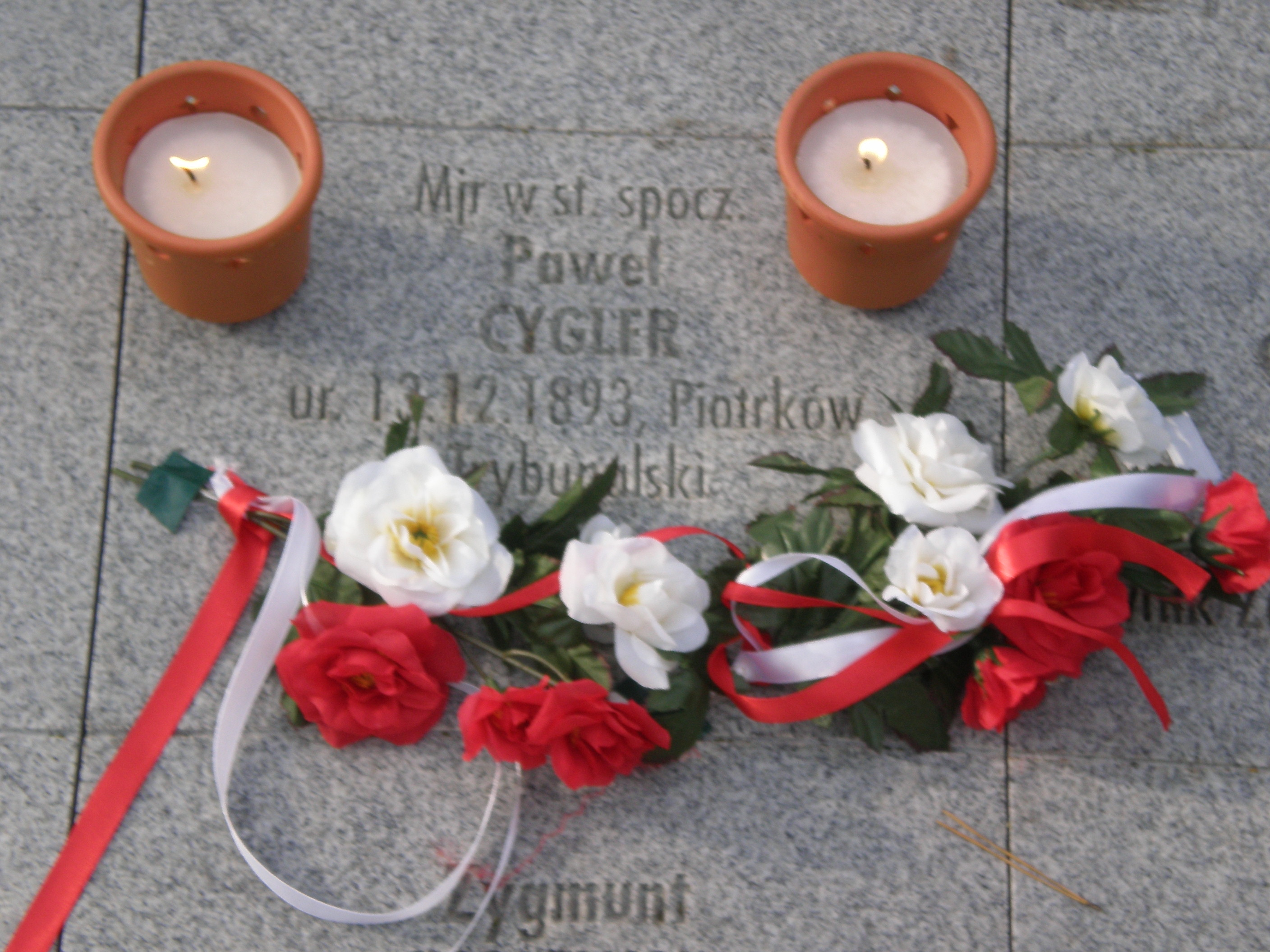 Epitafium mjr Pawła Szczęsnego Cygler. IV Polski Cmentarz Wojenny Kijów-Bykownia 21.09.2012 r.